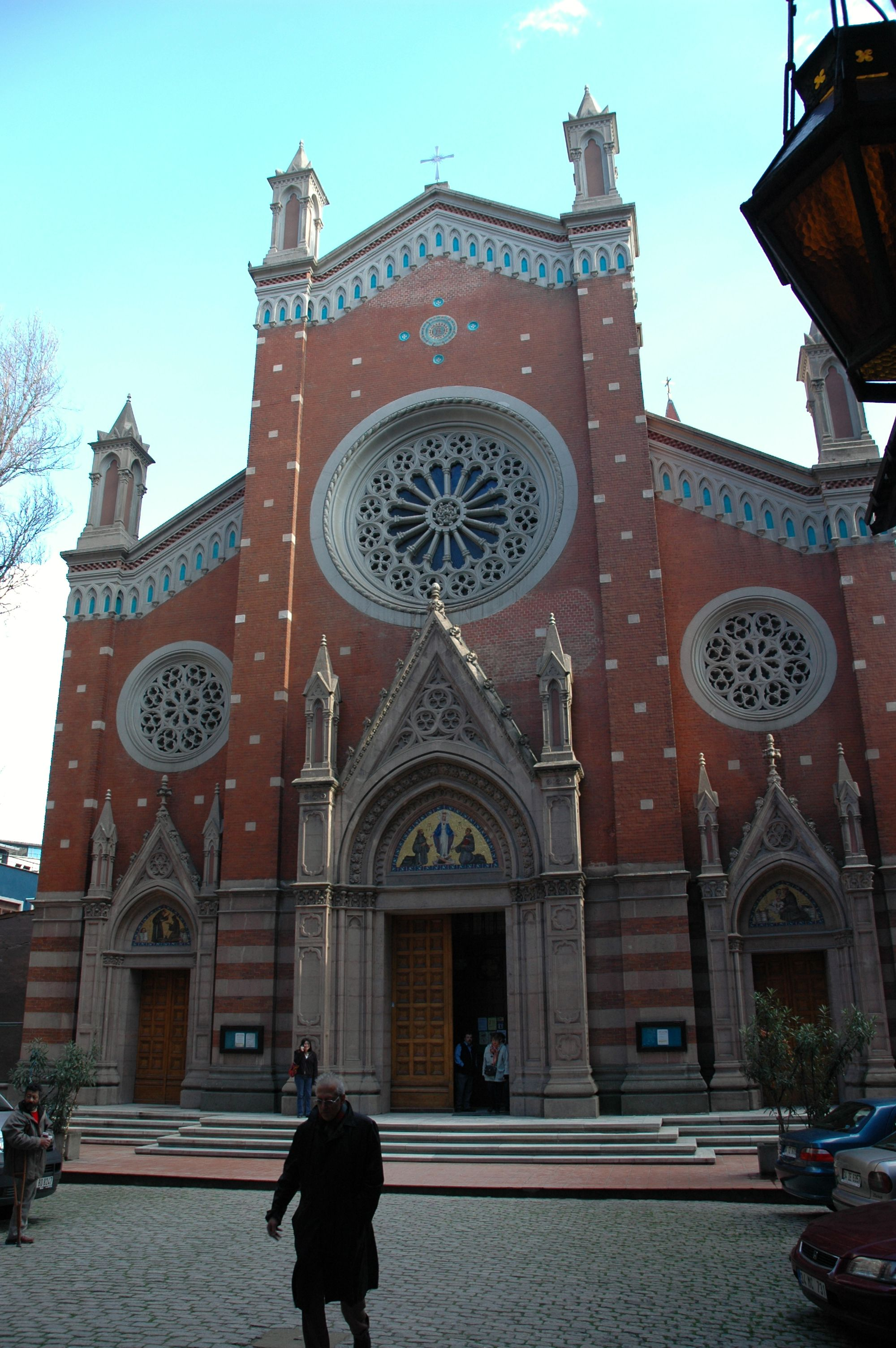 Istanbul - Sant Antoni de Pàdua